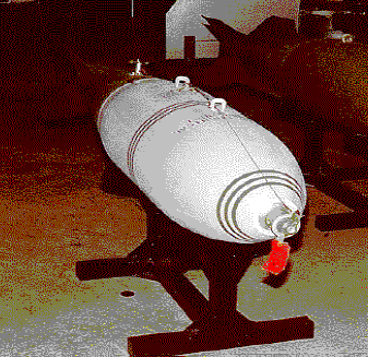 An MC-1 gas bomb